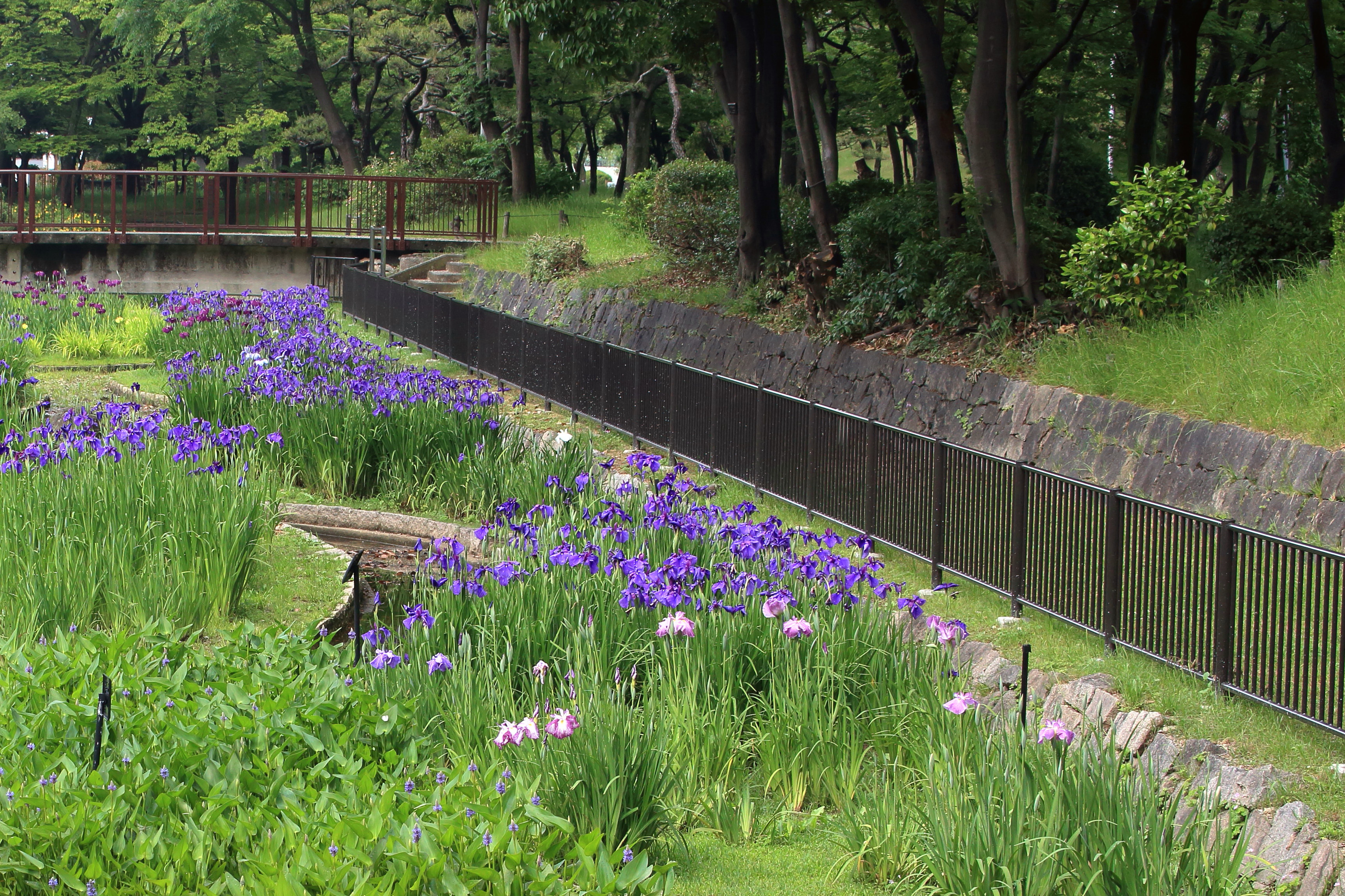 堺台場跡（菖蒲池から）